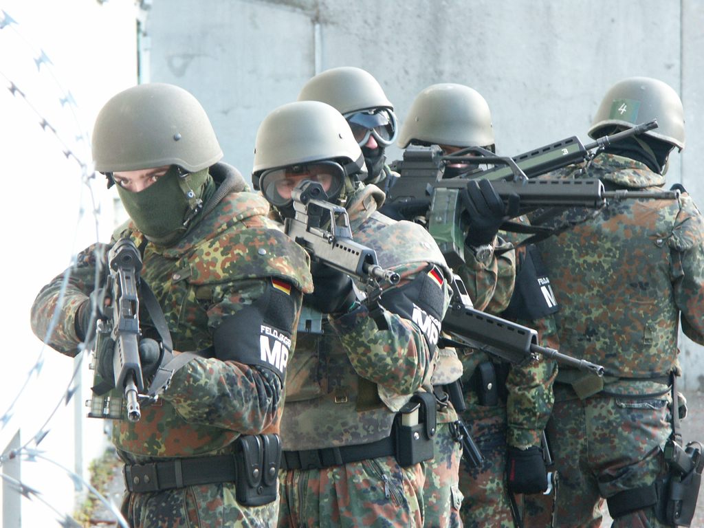 Feldjäger bei einer Zugriffsübung